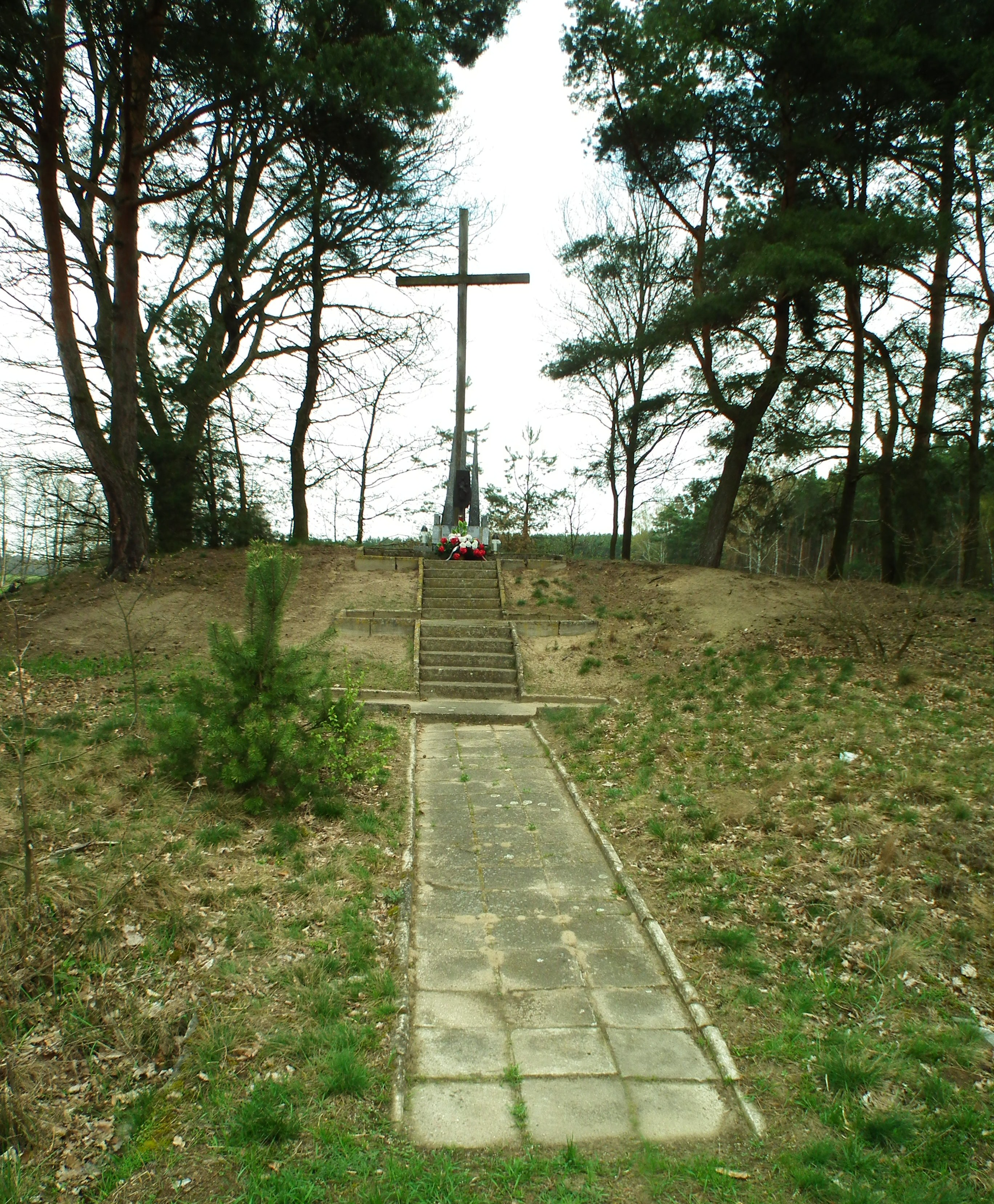 Mogiła powstańców styczniowych w Myszakowie, gm. Zagórów.